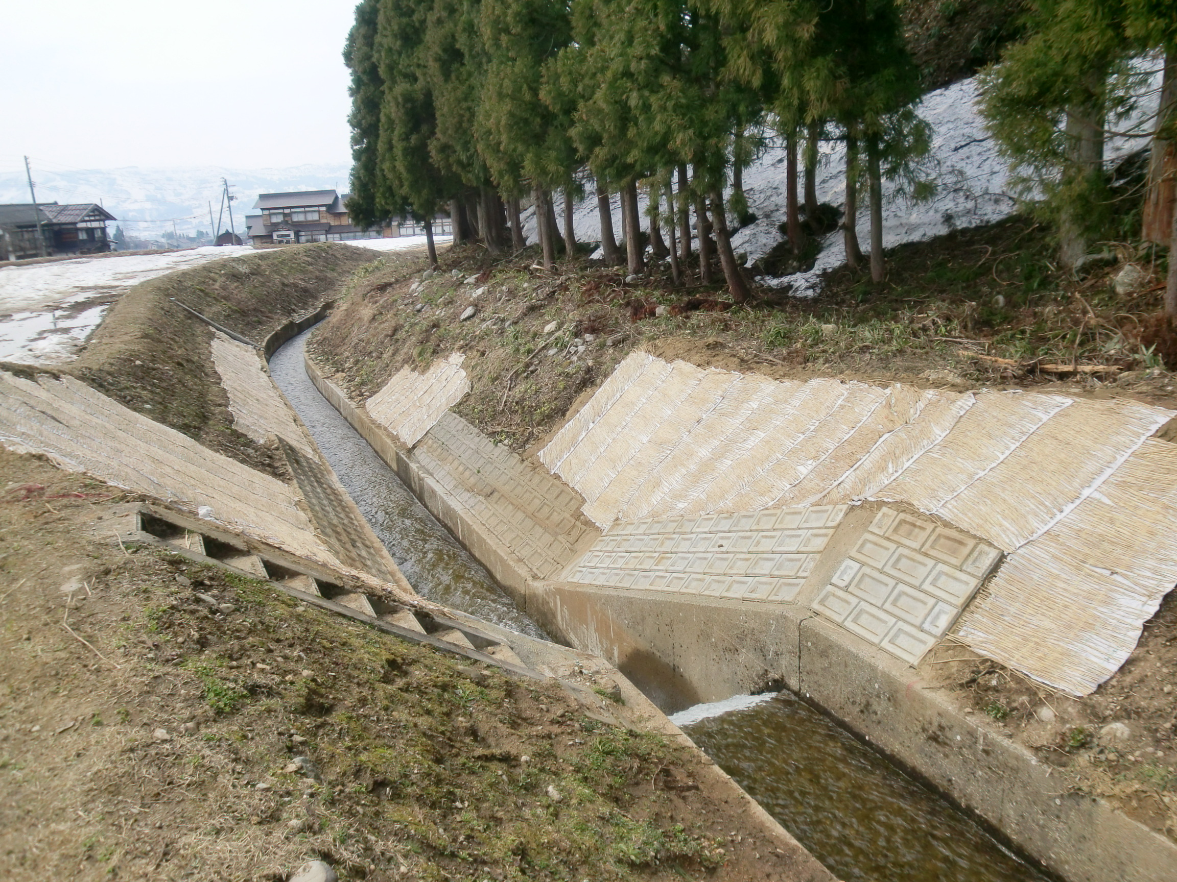 山地排水工事完了、4月17日撮影